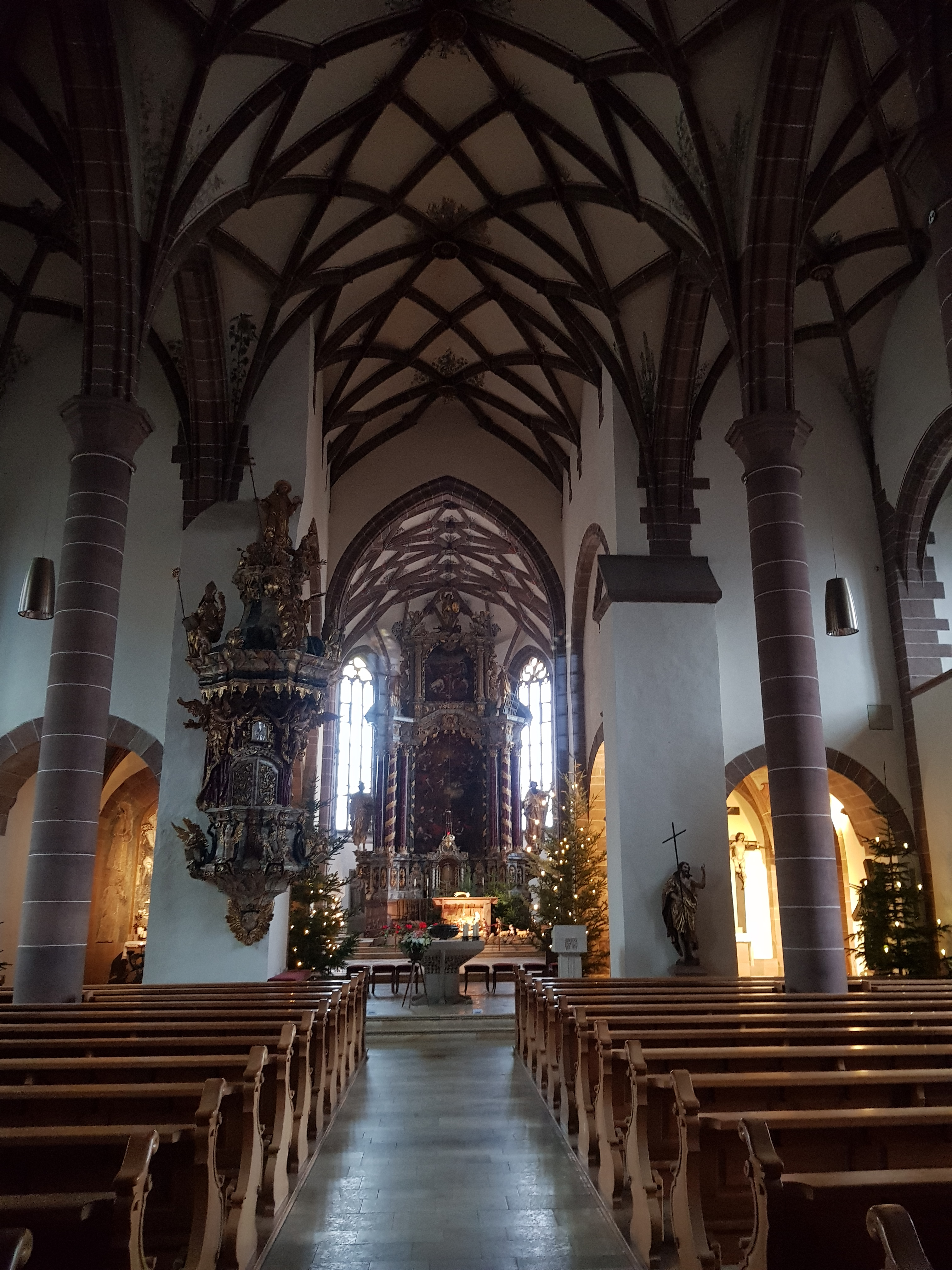 Innenraum der Stadtkirche Weil der Stadt